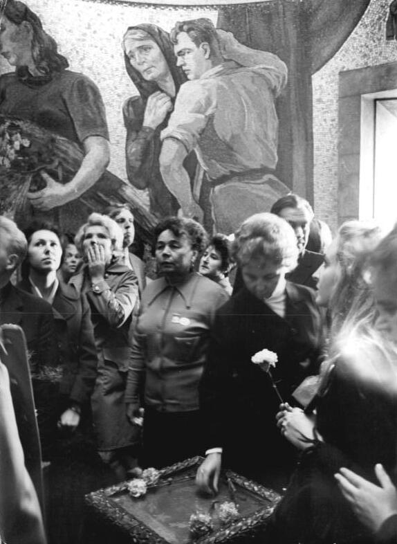 ADN-ZB Junge 9.9.72 Berlin: Ehrendes Angedenken an sowjetische Helden. In der Krypta des Sowjetischen Ehrenmals in Treptow ehrten am 9.9.72 Gäste der Hauptstadt aus der UdSSR im schweigenden Angedenken die im Kampf gegen den Hitlerfaschismus gefallenen Söhne des ersten sozialistischen Staates der Erde.